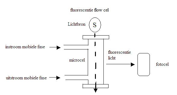 Overzicht van een flow cel in een fluorescentie detector